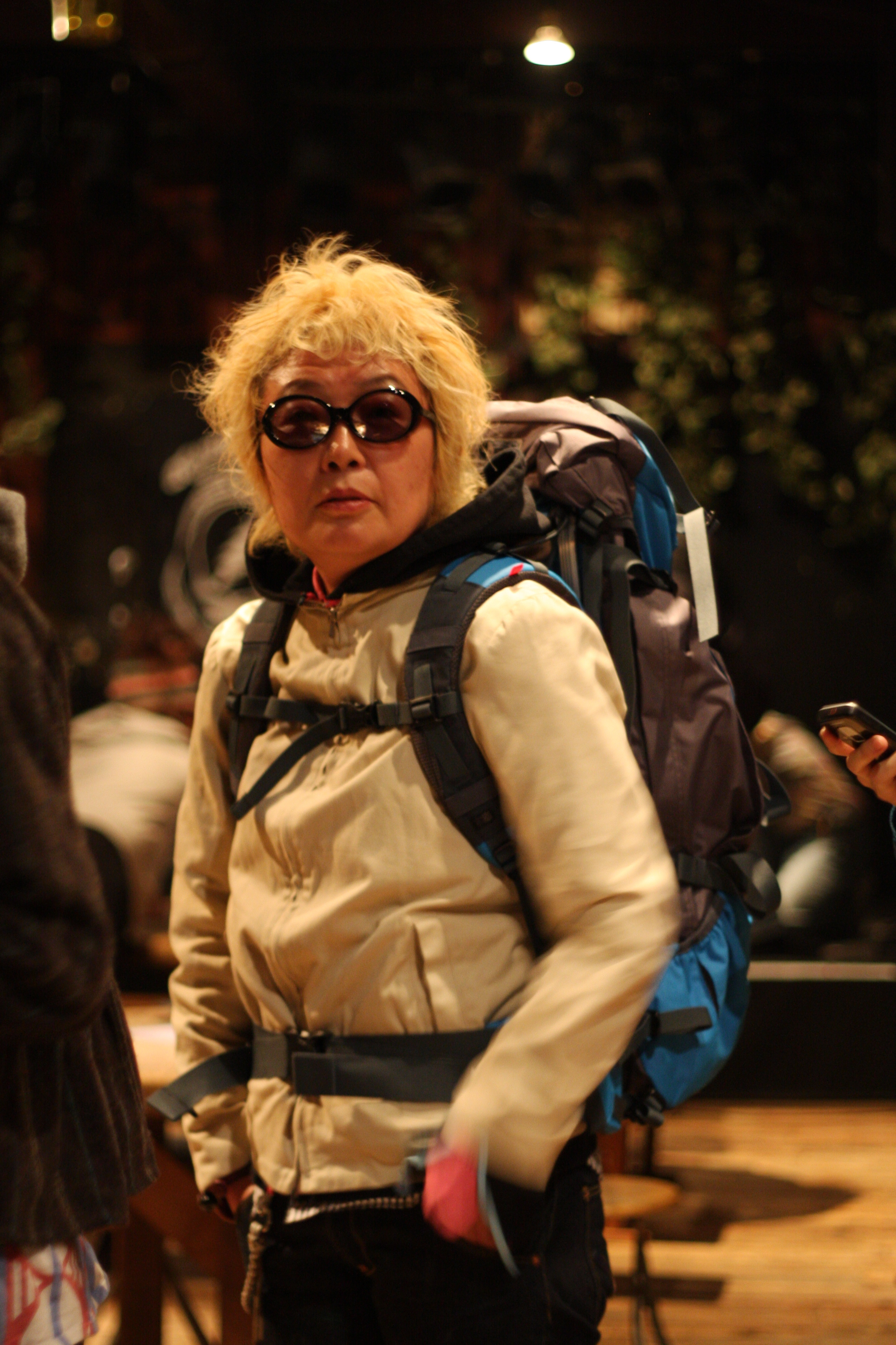 MAYA MAXX at 磔磔 (Roots of The Grateful Dead - TWIN PEAKS)